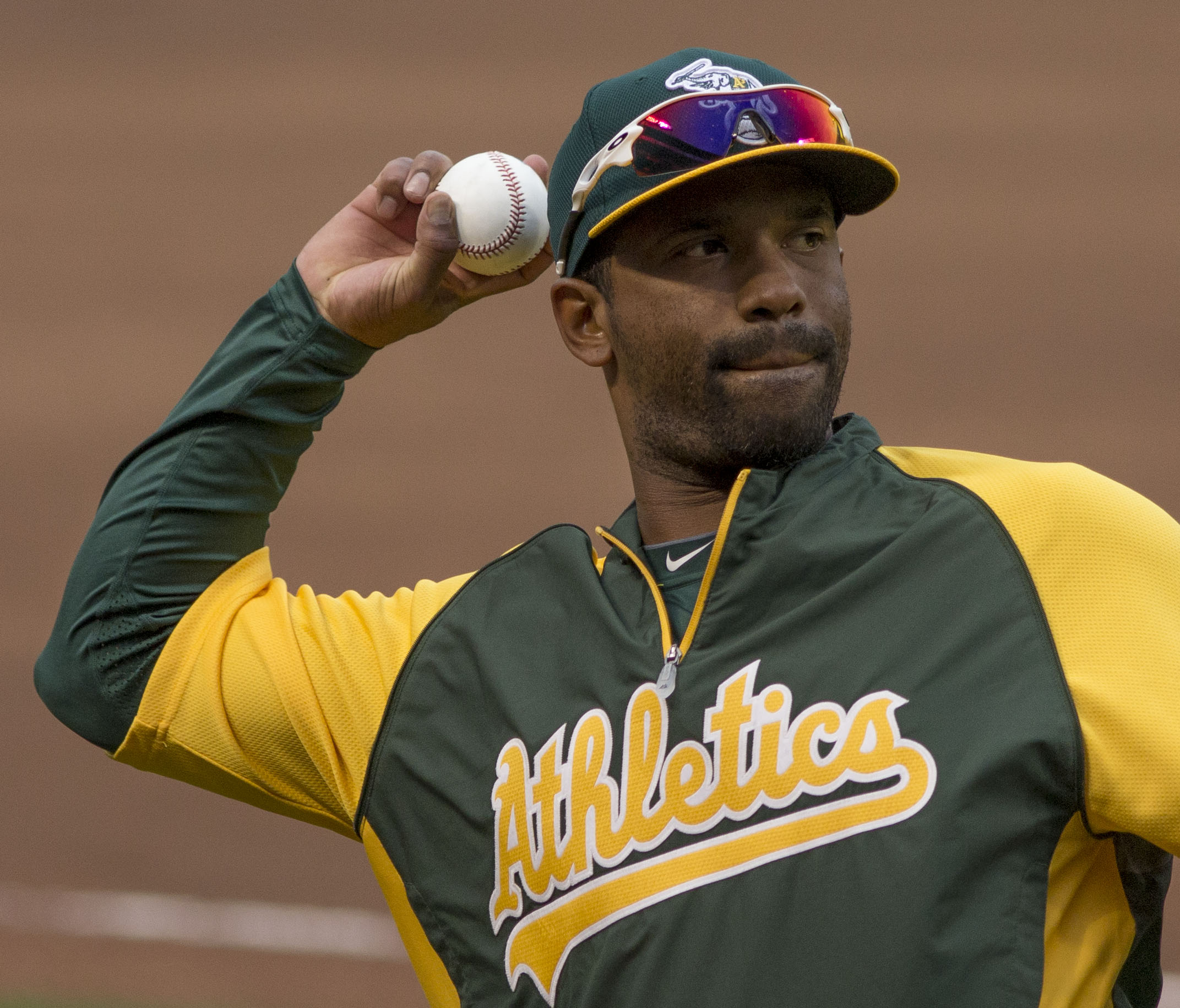 Alberto Callaspo